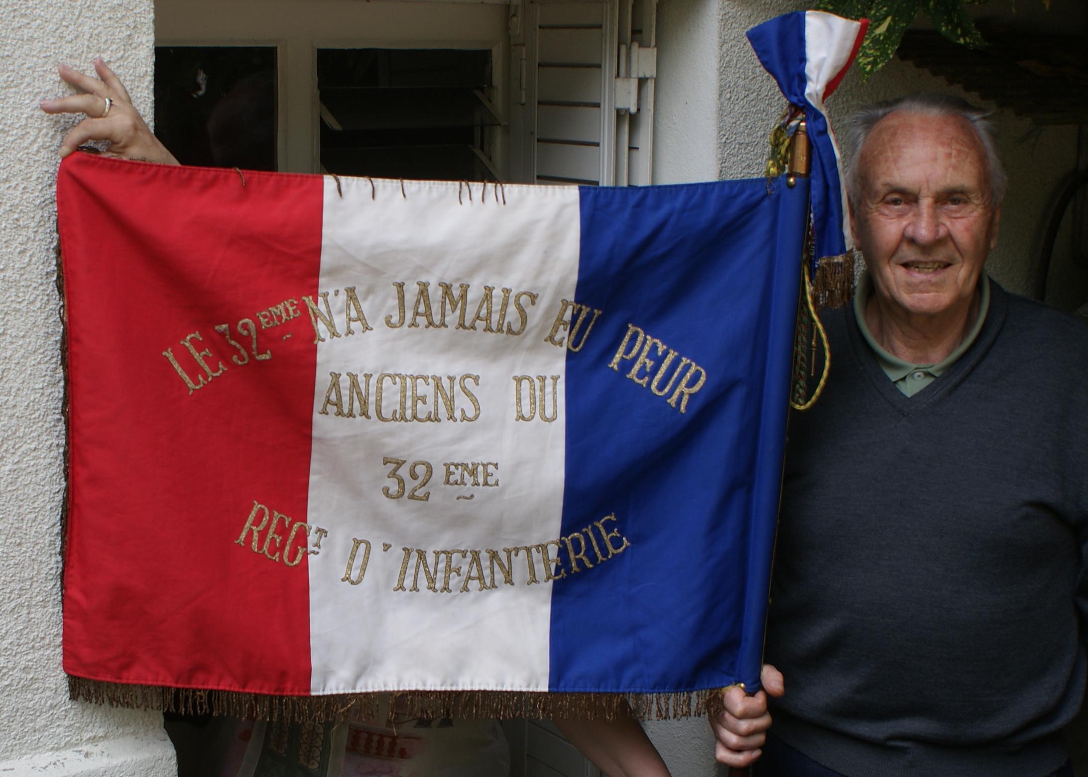 Drapeau de l'Amicale des anciens du 32e RI et du 232e RI tenu ici par M. Dupont qui en a la garde.